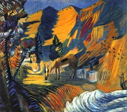 «Ծովափին: Սֆինքս», 1908, ստվարաթուղթ, տեմպերա, 63,4 х 73,6 սմ